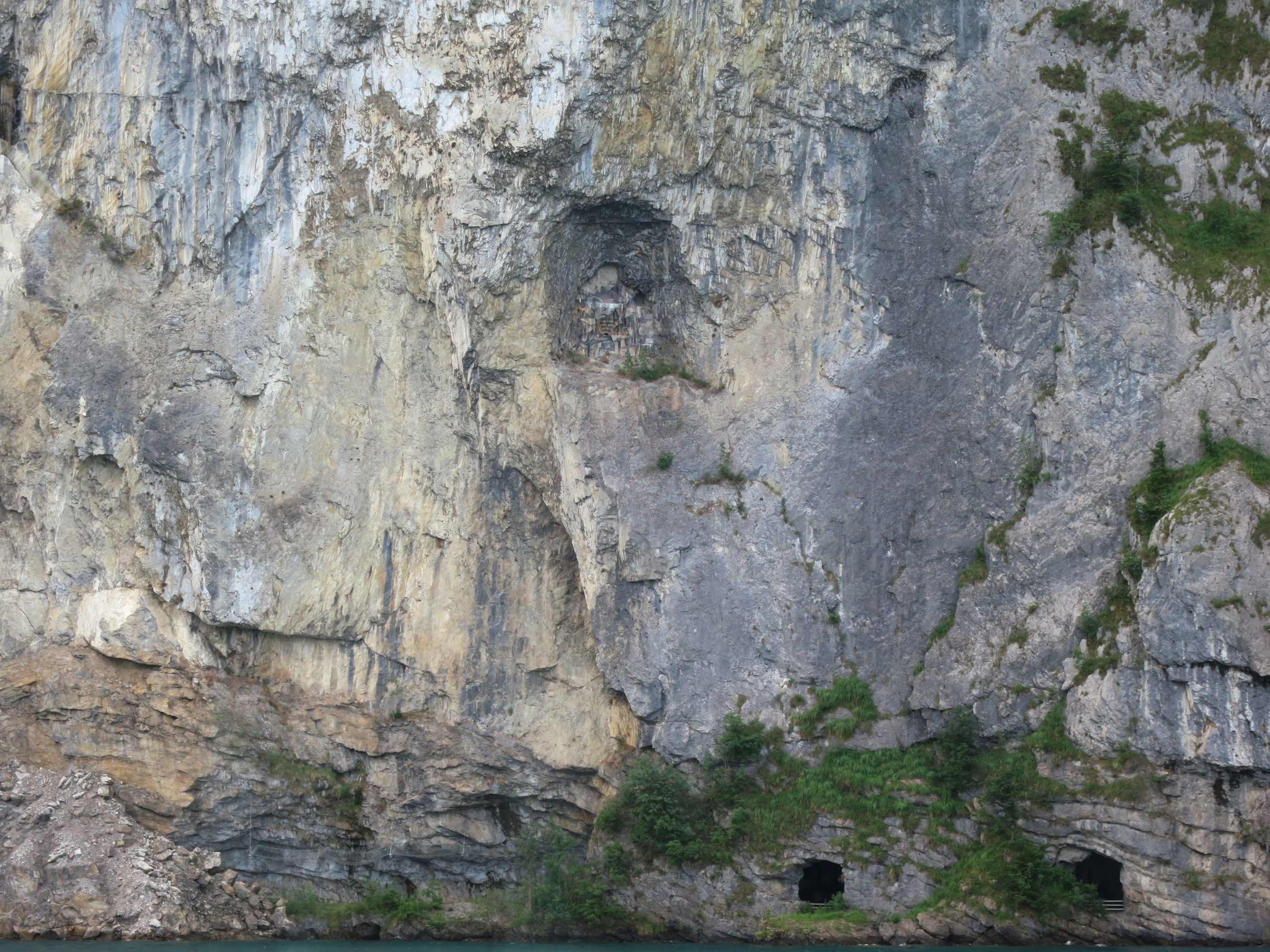 Artilleriefestung Isleten A8730, Bauen UR, Schweiz